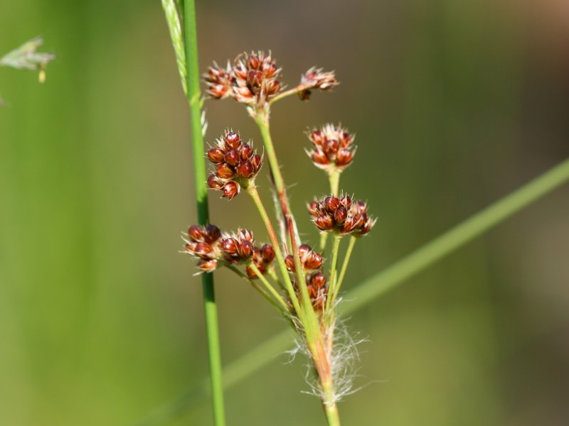 Vielblütige Hainbinse (Luzula multiflora)